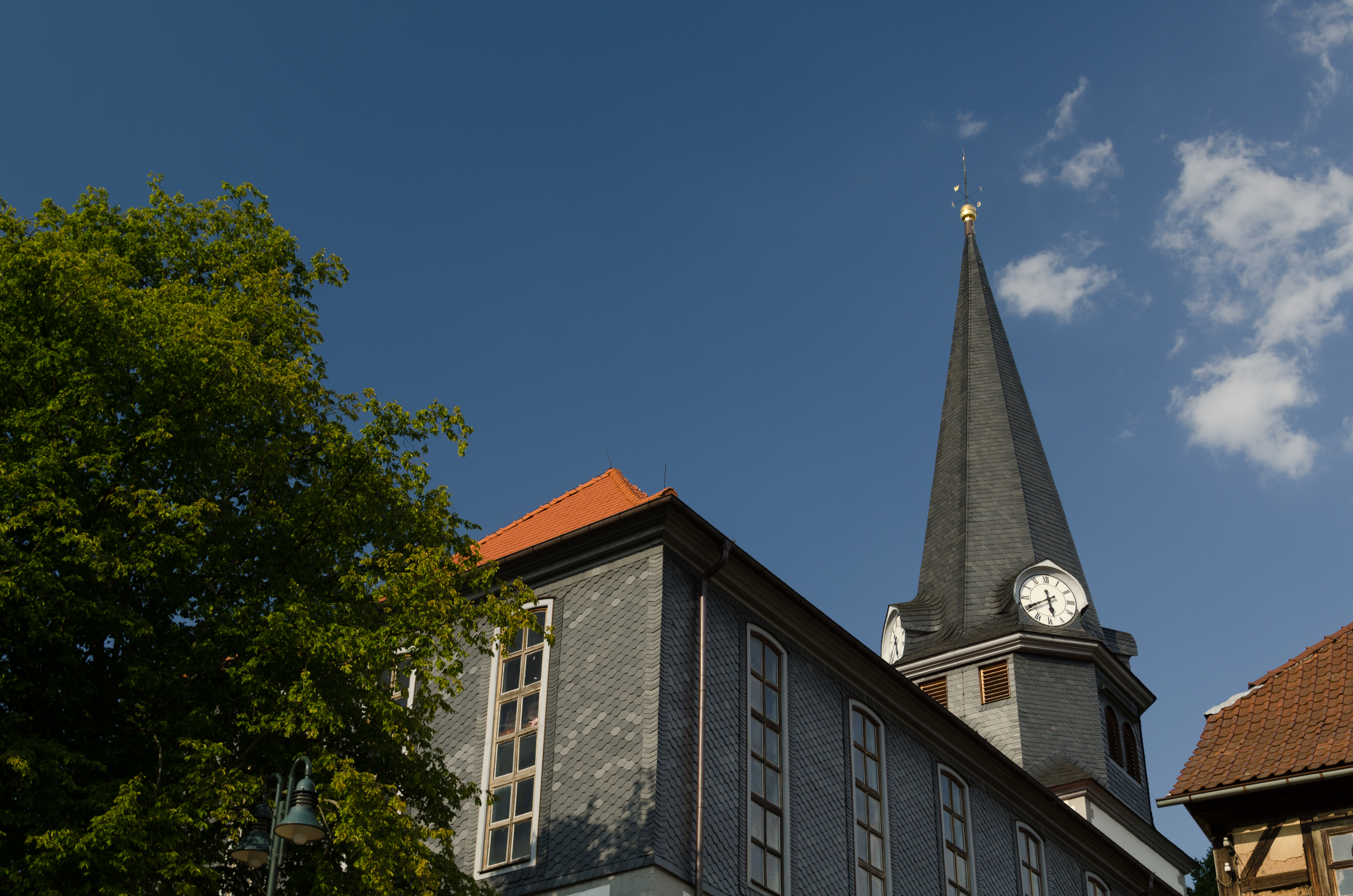 Viernau, Kirchberg, Ev. Kirche